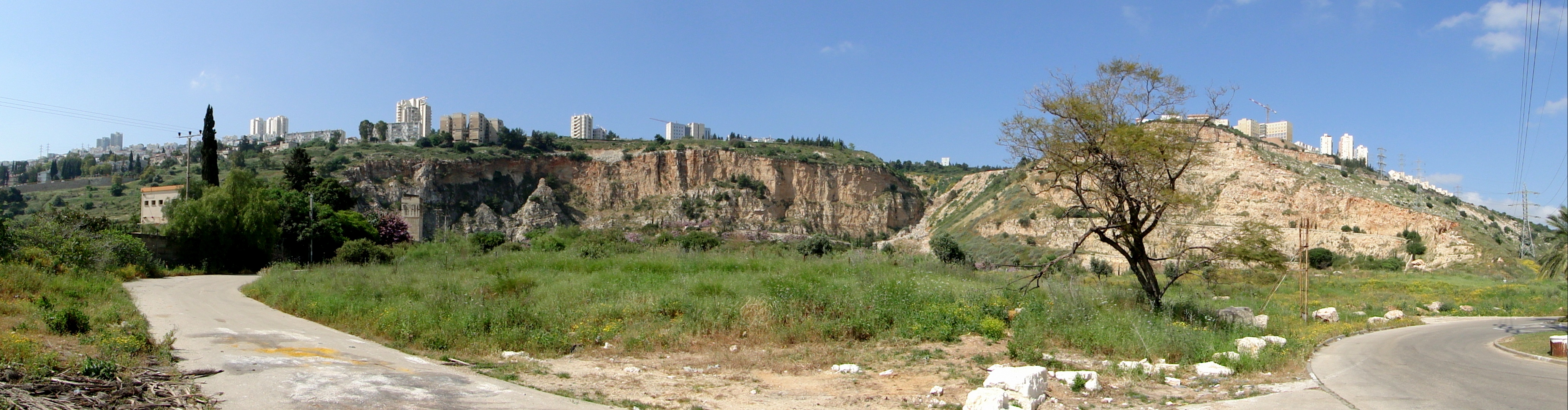 Nesher – Panoramic view, The city Nesher in Israel מחצבת 4.5 שכונת בן דור משמאל מימין בתי נווה שאנן שכונה בחיפה המחצבה נקראת על שם הקילומטר ה-4.5 משער נמל חיפה נמצאת מצפונה ומערבה של השכונה. המחצבה הוקמה בשנת 1929 על ידי חברת תעשיות אבו וסיד ונוהלה על ידי "הנהלת העבודות" שליד מרכז העבודה של ההסתדרות בחיפה. המחצבה משתרעת על שטח של 250ב המחצבה נסגרה סוף שנות ה-60 של המאה ה-20 מחצבת 4.5 שכונת בן דור משמאל מימין בתי נוו שאנן שכונה בחיפה